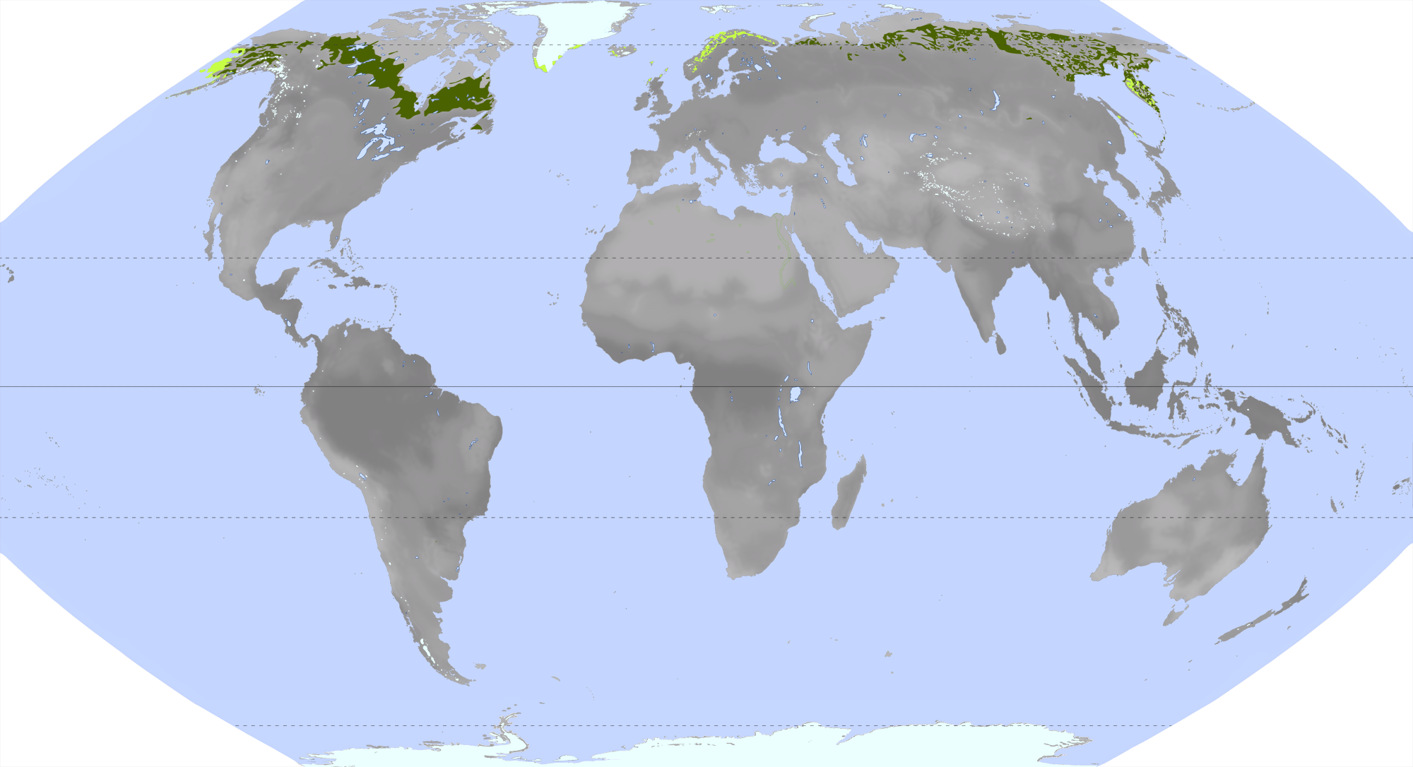 === quellen == Auszug der Wikimedia-Karte Vegetationszonen.png, ebenfalls mein eigenes Werk kartographie Eckert VI-Projektion (nahezu flächentreu, realistische Größenverhältnisse, relativ wenig verzerrt), erstellt mit (Lizenz CC-BY) datengrundlagen → siehe: Literaturangaben der Originalkarte legende (german) Die verwendeten Farben entsprechen nicht der Legende der Originalkarte! Die Modifikation wurde vorgenommen, um die Erkennbarkeit der Flächen auf der Vorschaukarte zu erhöhen.